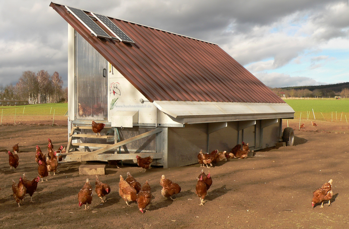 Freilandhaltung mit mobilem Hühnerstall